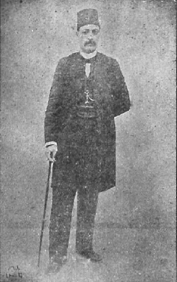 مصرى: يعقوب نخلة روفيله